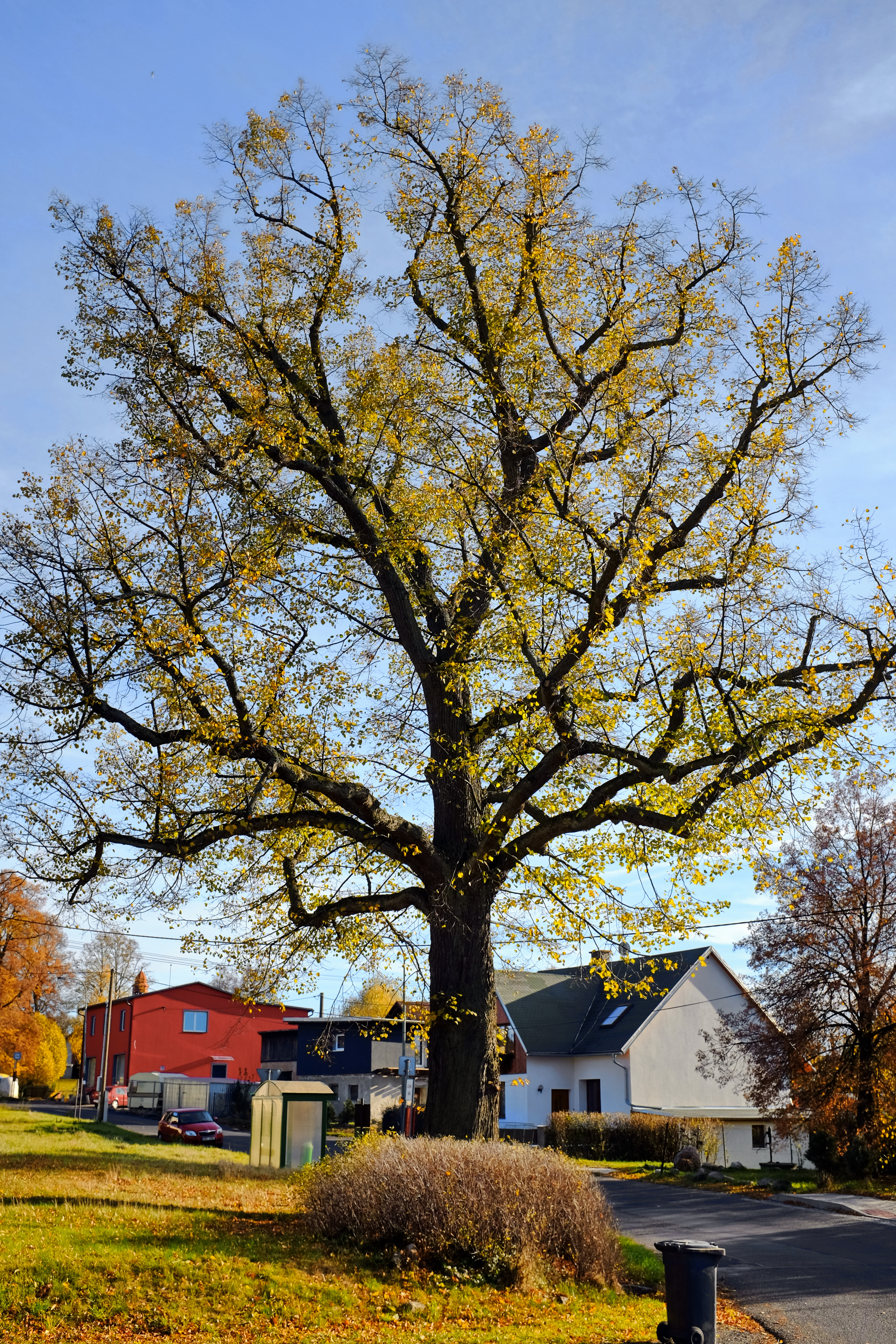 Památný strom - Lípa u křížku, Olšová vrata, Karlovy Vary